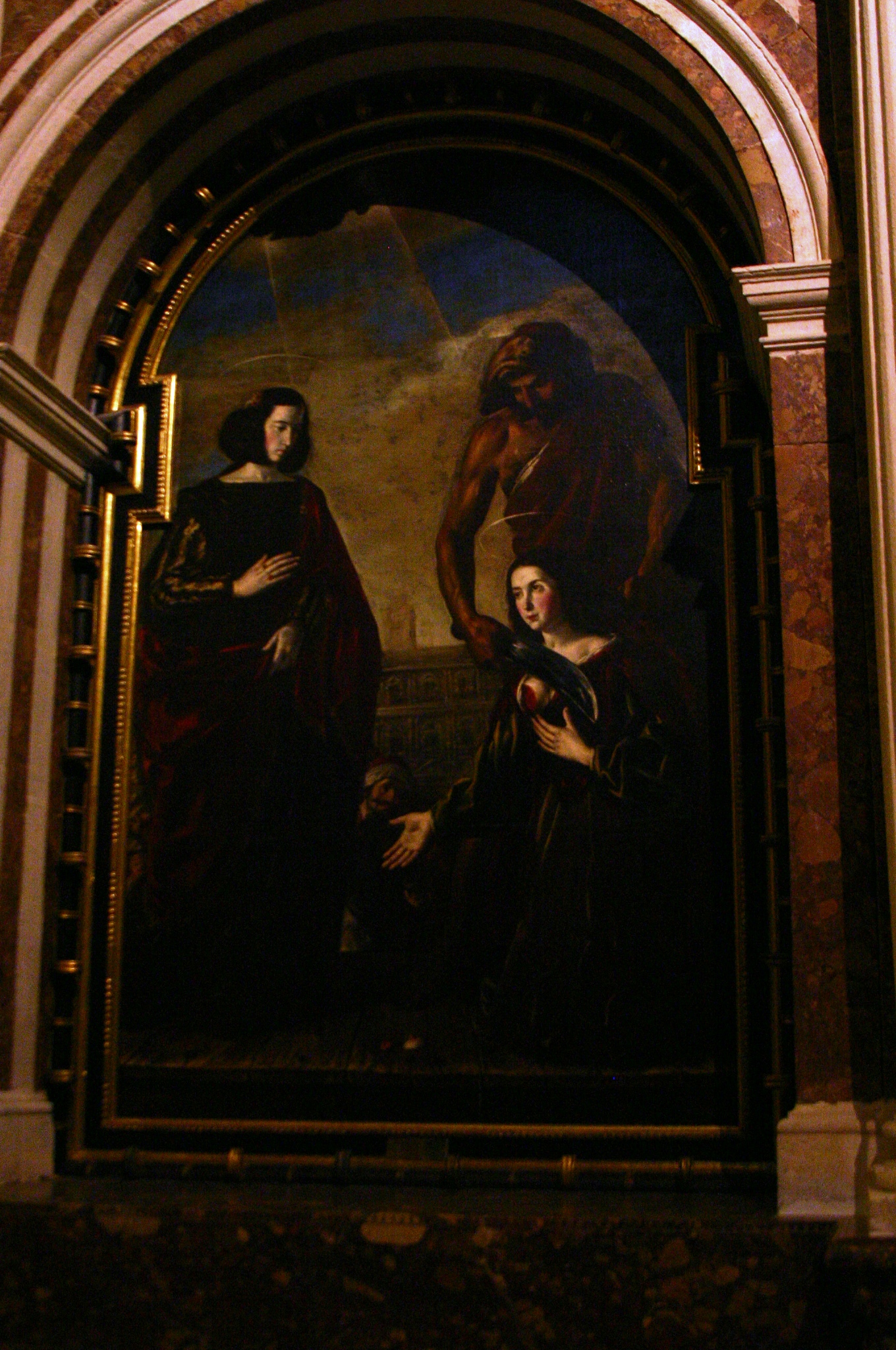 Interior da Catedral